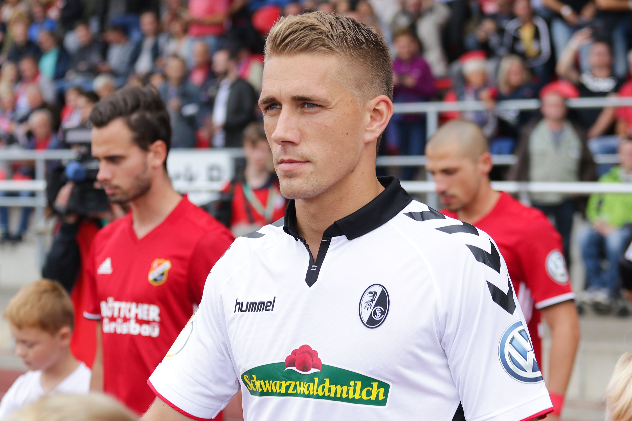 Nils Petersen beim DFB-Pokalspiel VfB Germania Halberstadt vs. SC Freiburg